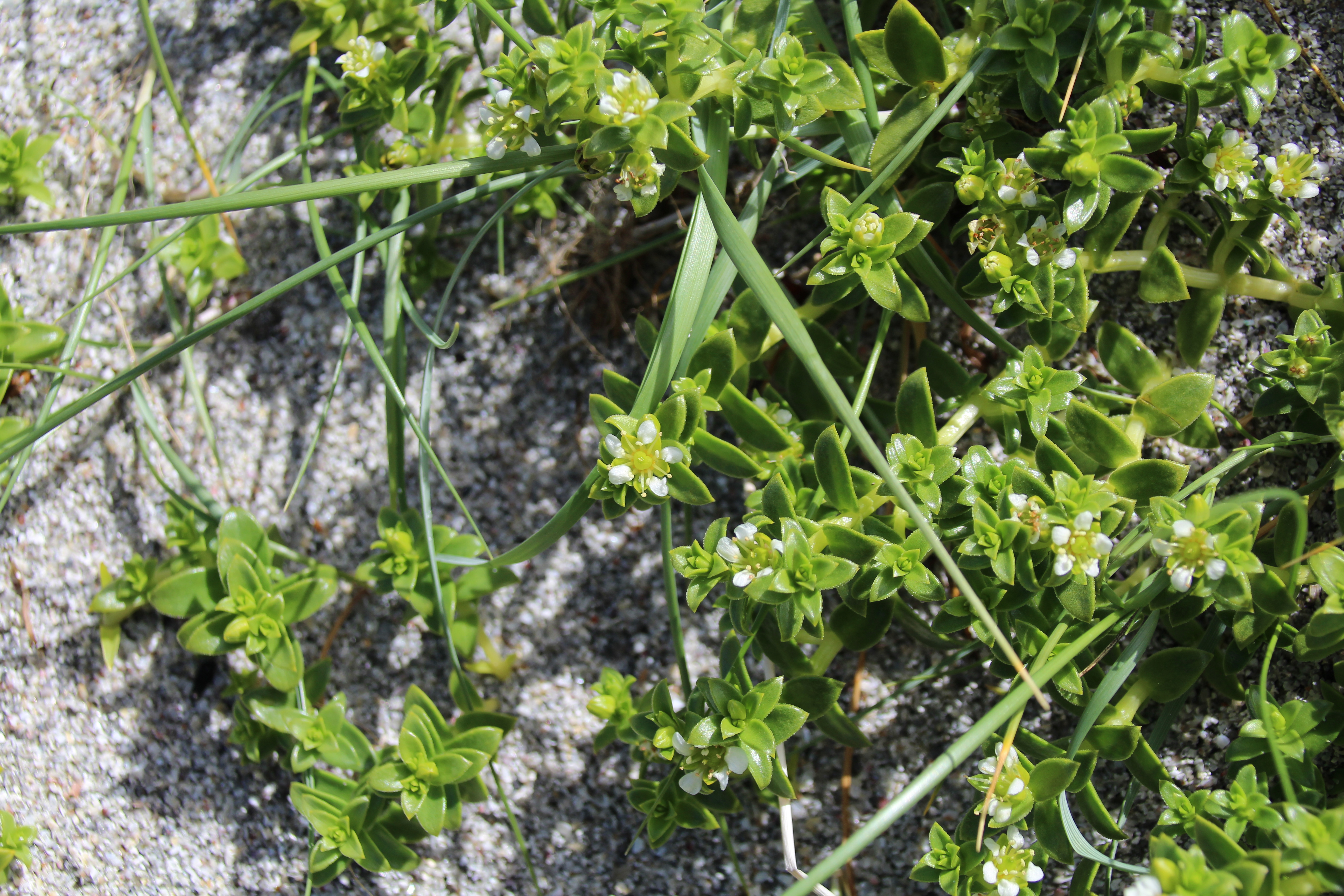 Salzmiere bzw. Honckenya peploides im Balranald-Vogelschutzgebiet. North Uist, Äußere Hebriden, Schottland